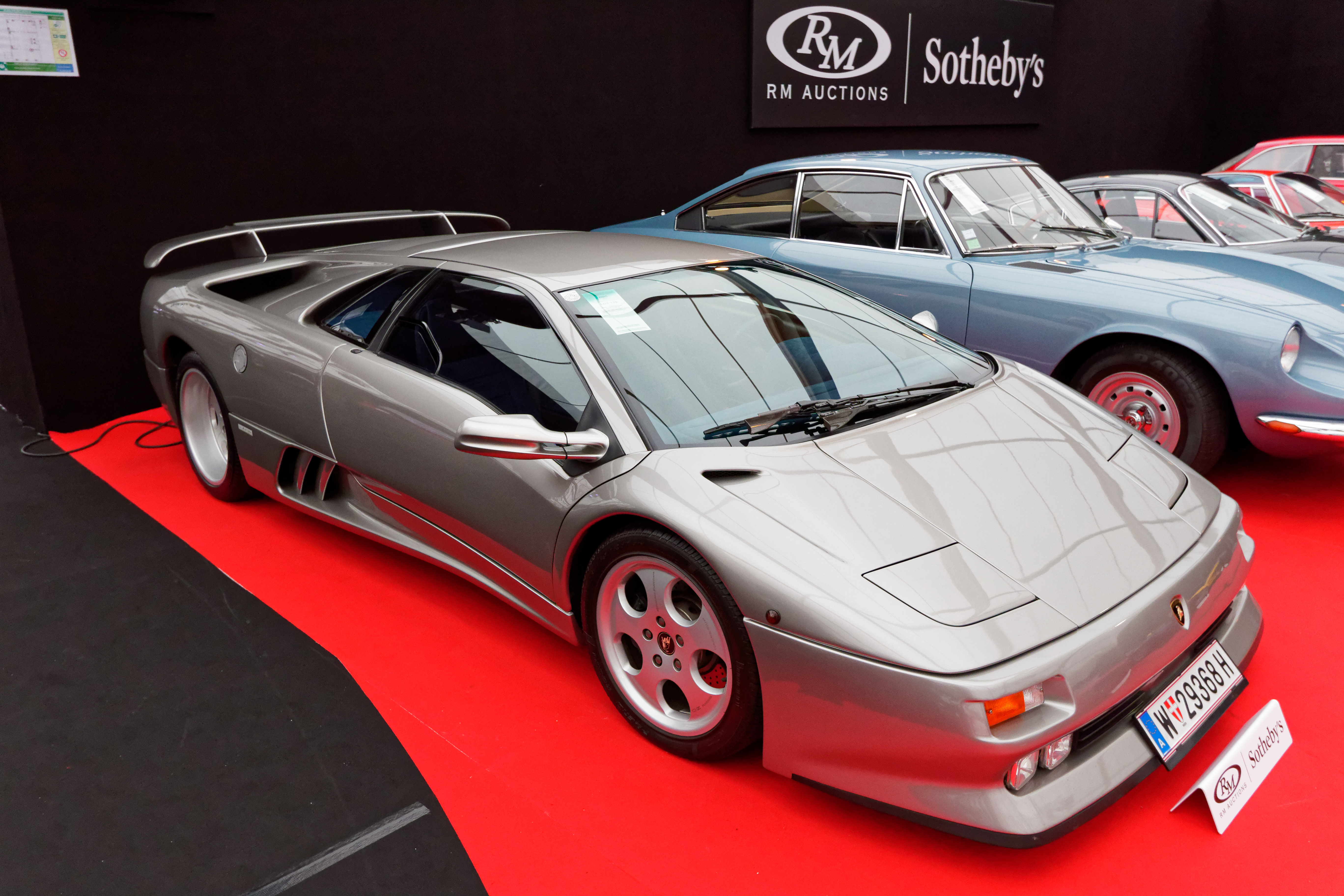 Un véhicule exposé lors de la vente RM Sotheby’s 2018 aux Invalides à Paris.